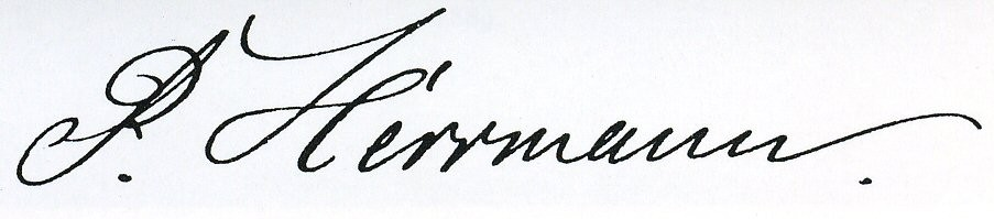 Unterschrift von Paul Herrmann